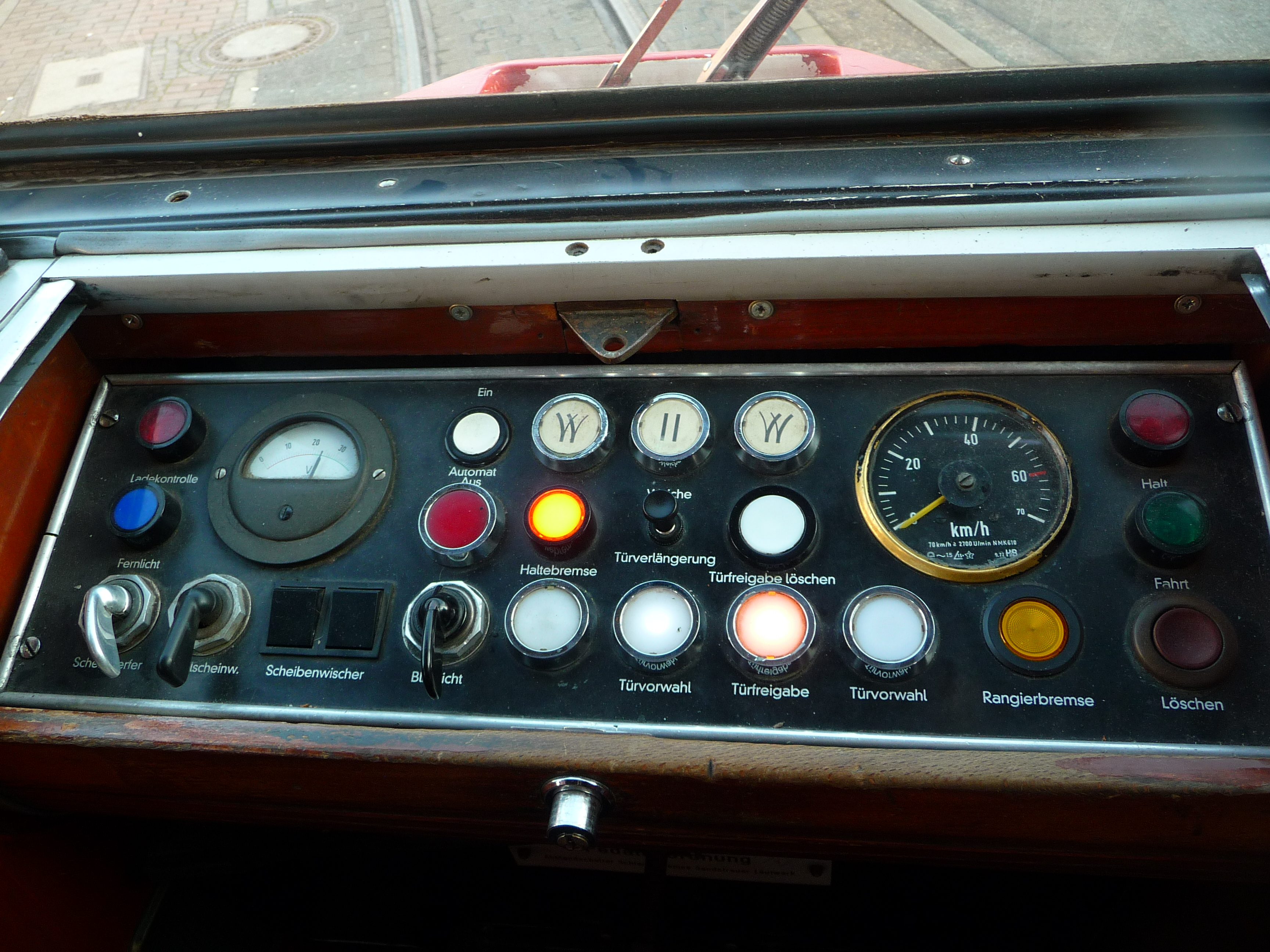 Bedienertableau im Führerstande eines DUEWAG Gt8 (Straßenbahnwagen), Baujahr 1975